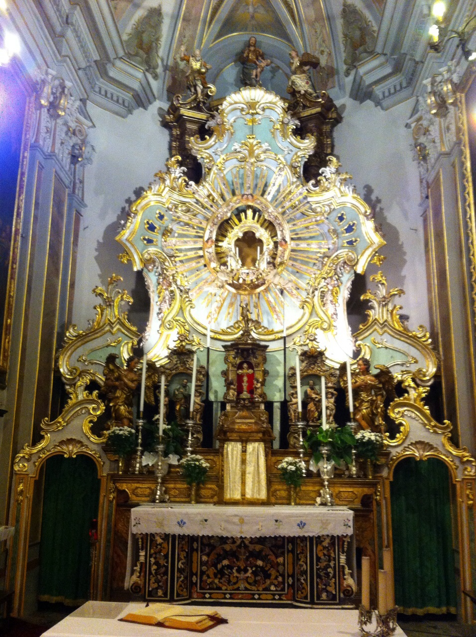 apparato/macchina del triduo di scuola fantoniana del 1783 chiesa parrocchiale dei santi Pietro e Paolo